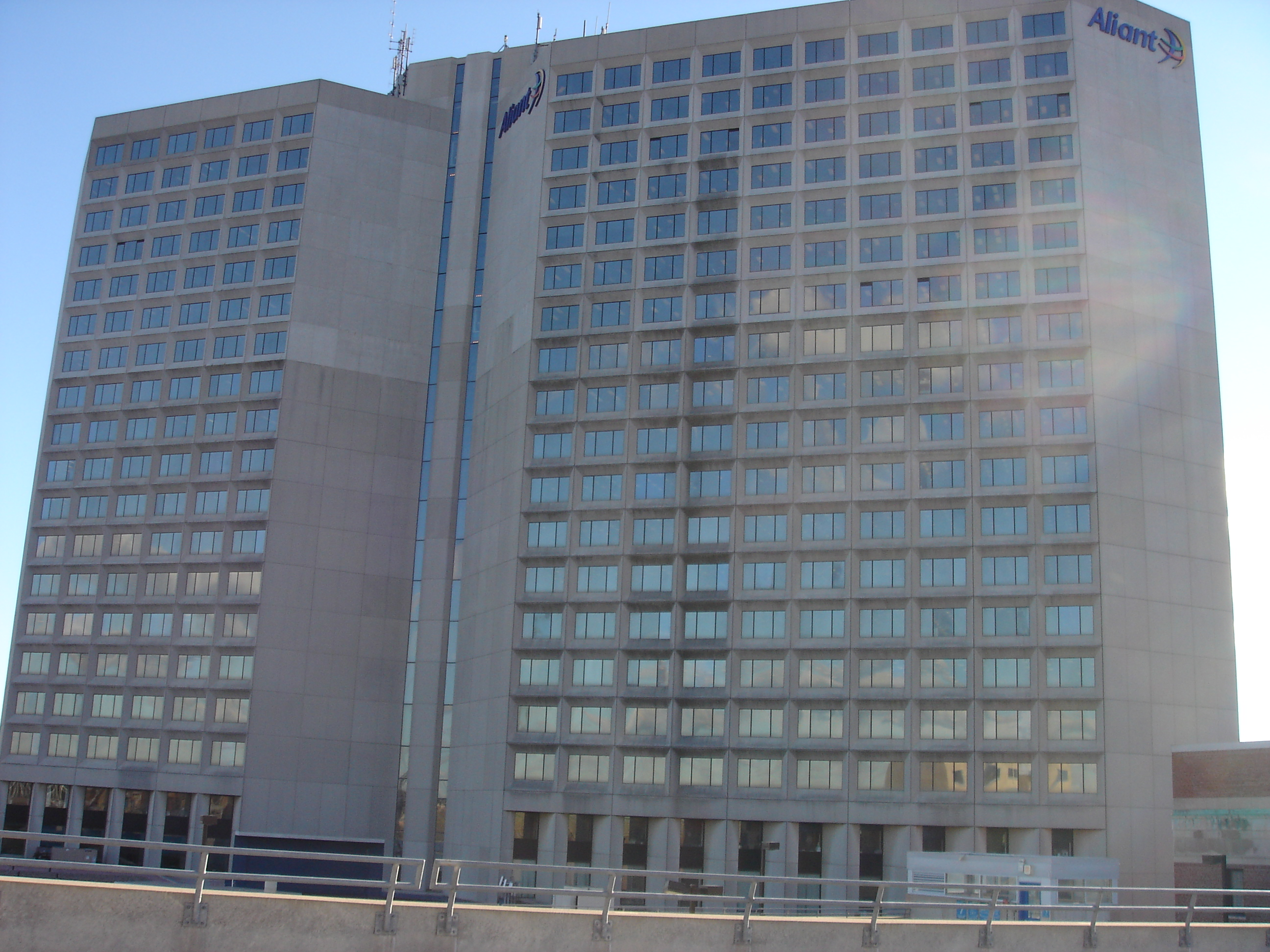 Maritime Center